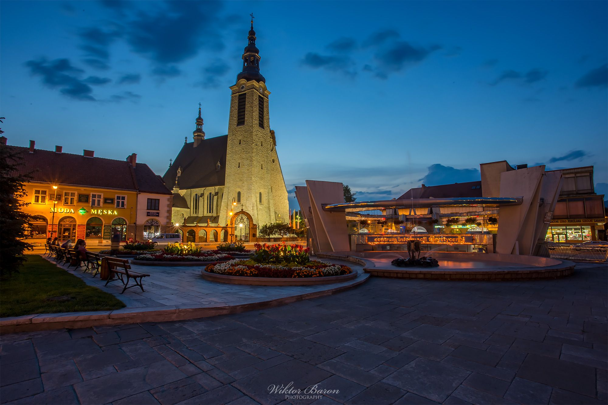 Limanowa, kościół parafialny pw. Matki Boskiej Bolesnej, 1911-1918